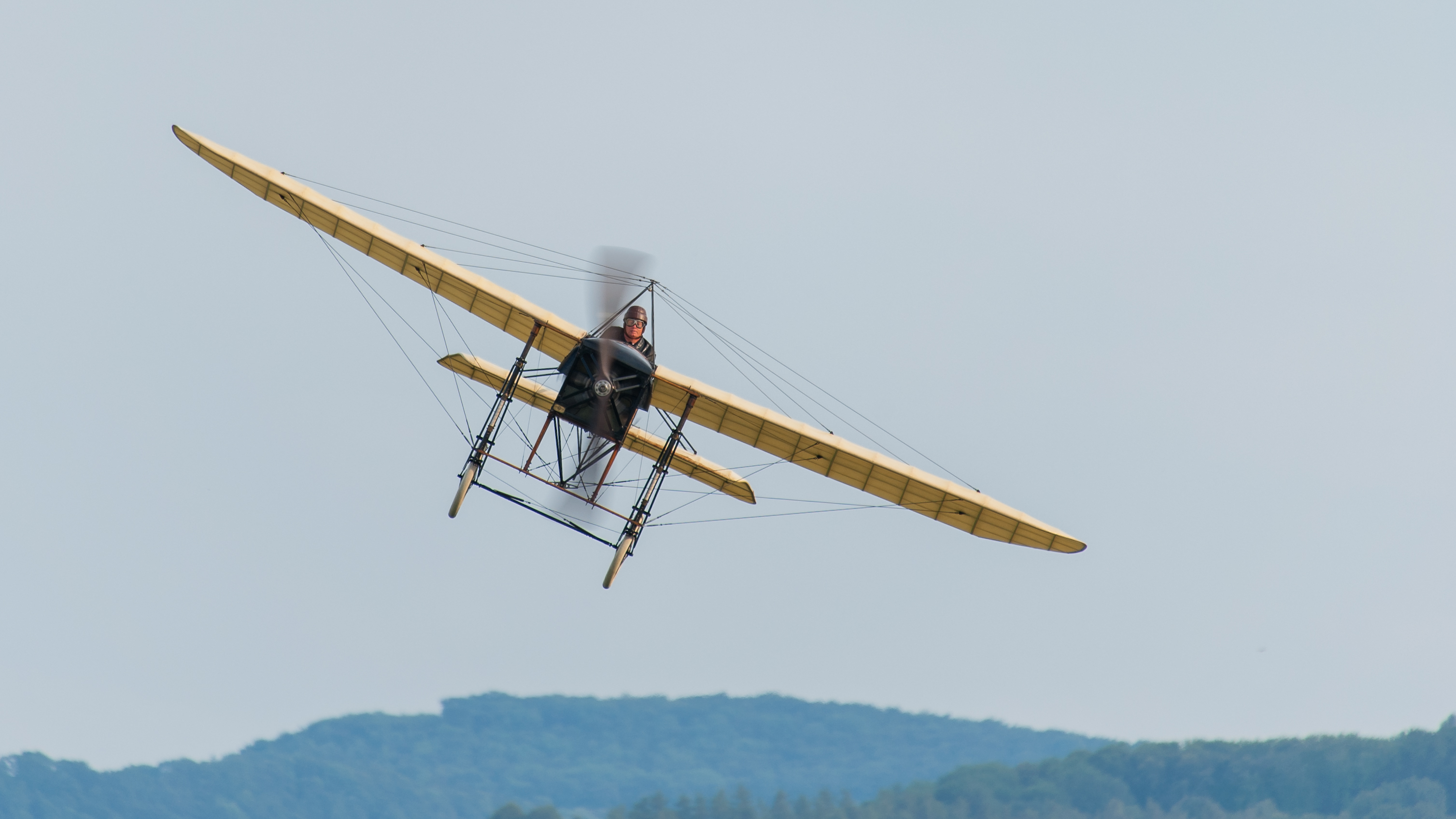 Eine Blériot XI, geflogen von Mikael Carlson beim Oldtimer Fliegertreffen, Flugfeld Hahnweide, Germany.